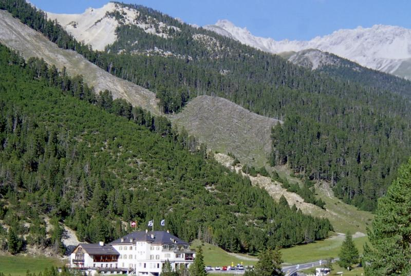 Hotel Fuorn an der Ofenpassstraße, Graubünden, Schweiz